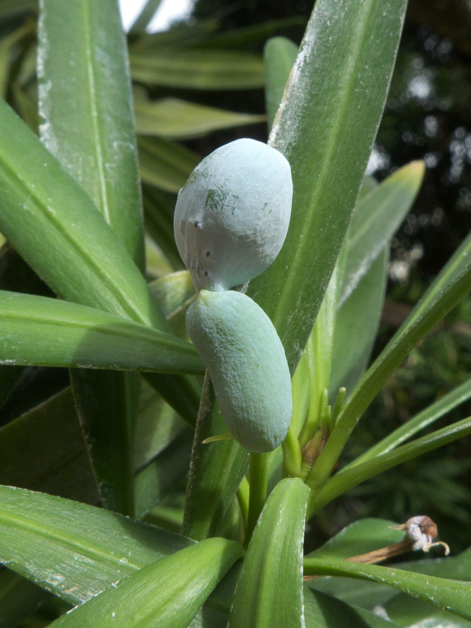 Fruto de Podocarpus neriifolius. Parque del Retiro, madrid, España.